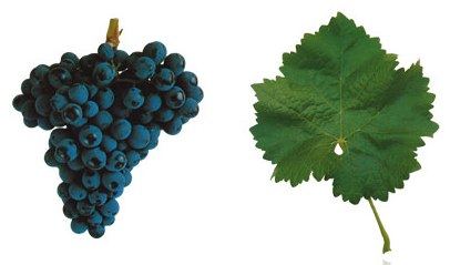 Traube und Blatt der Rotweinsorte 'Trincadeira'